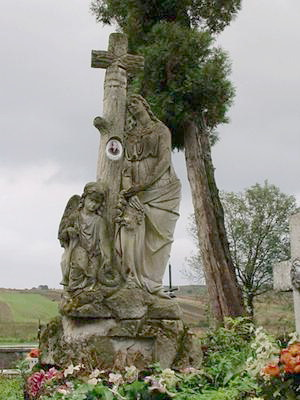 alter Grabstein - Zygmunt de Scibor-Rylski, Dudyńce Marek Silarski